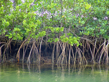 Mangue Manguezal